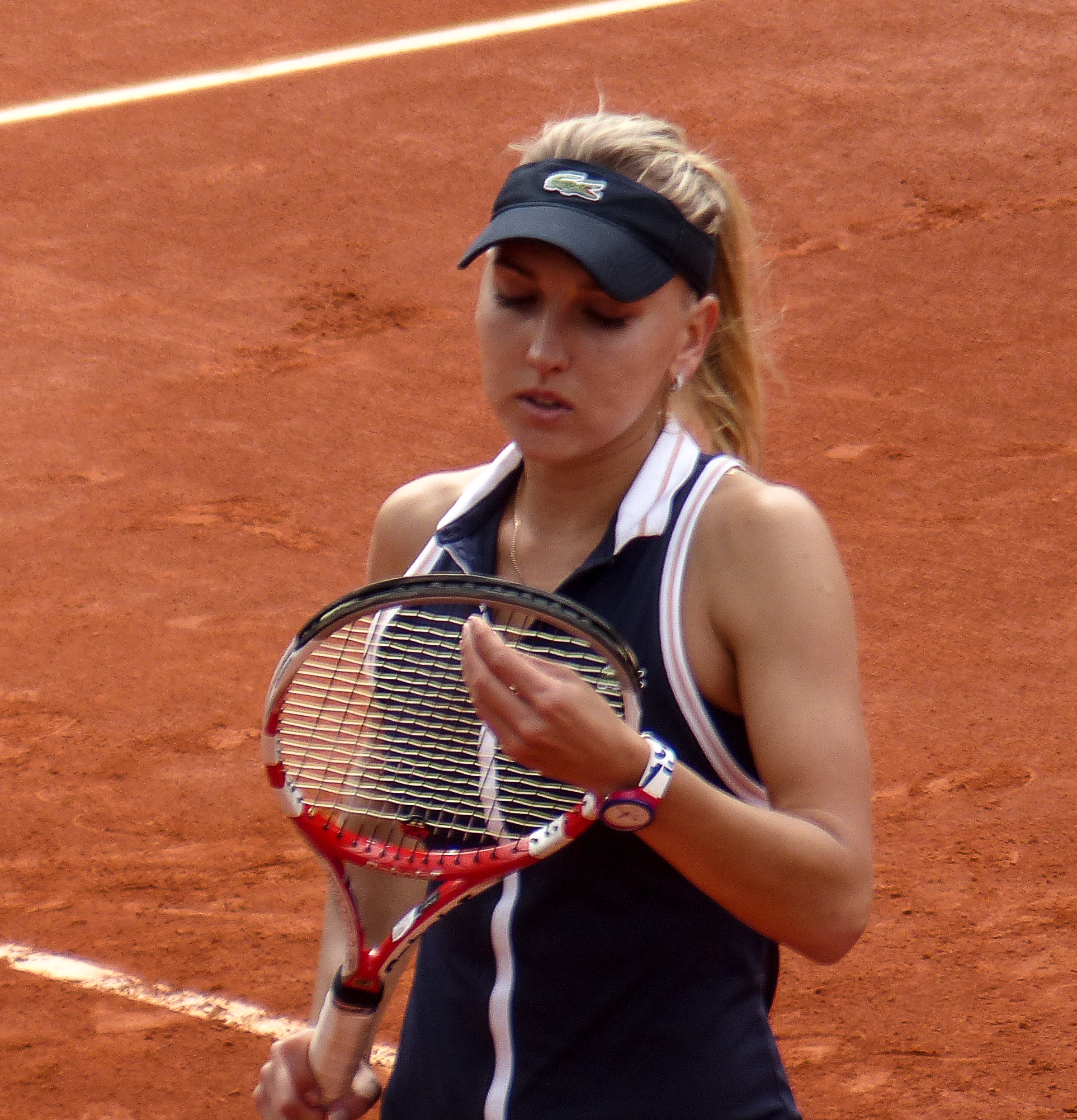 2ème tour Roland Garros 2013 : Victoria Azarenka (BLR) def. Elena Vesnina (RUS)